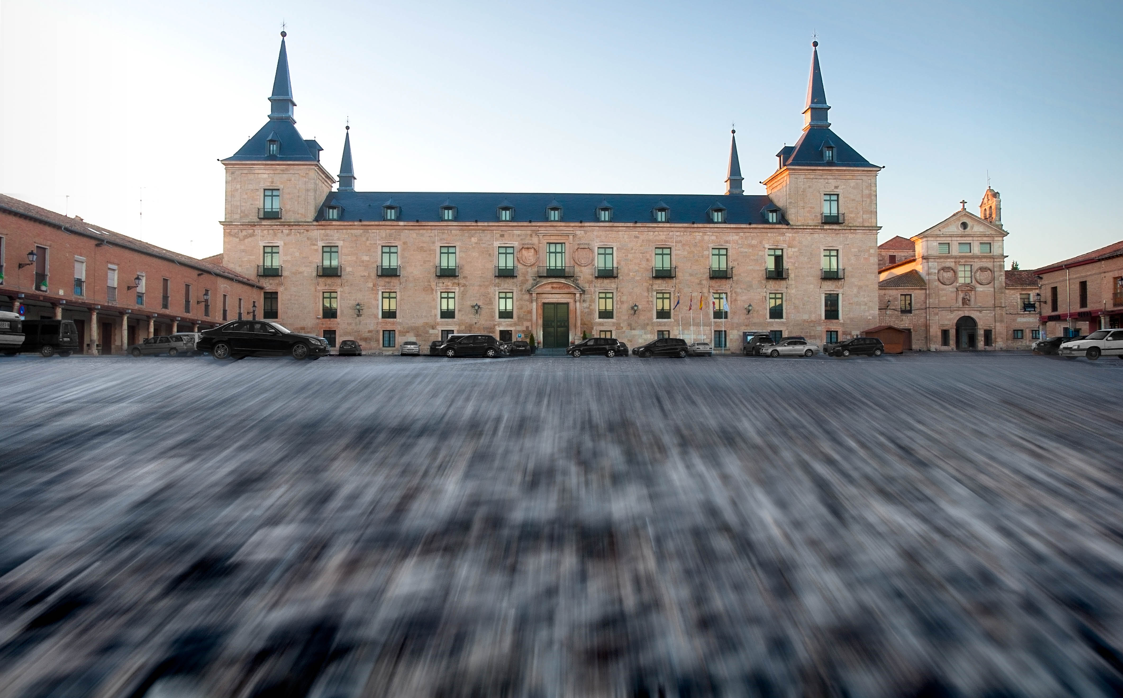 Palacio ducal de Lerma (Burgos, España).